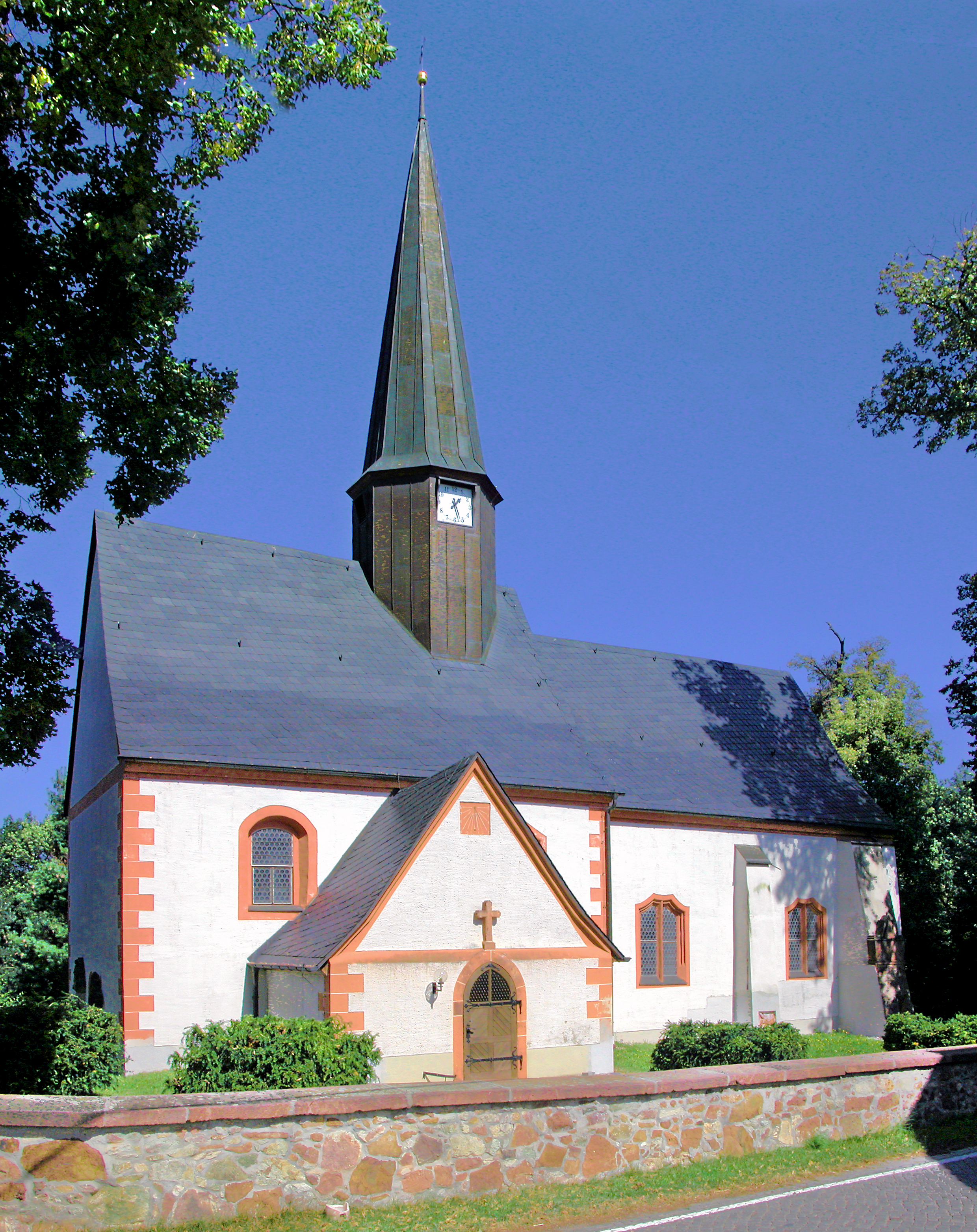 01.09.2009 04643 Syhra (Geithain) Hauptstraße 46 (GMP: 51.038558,12.646043): Dorfkirche, spätgotisch Anfang 16. Jahrhundert mit Benutzung romanischer Teile. [DSCN38736-38737.TIF]20090901260MDR.JPG(c)Blobelt